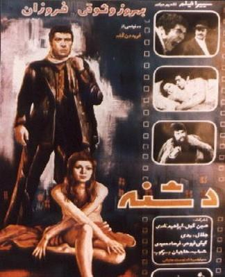 پوستر فیلم دشنه در 1972 میلادی